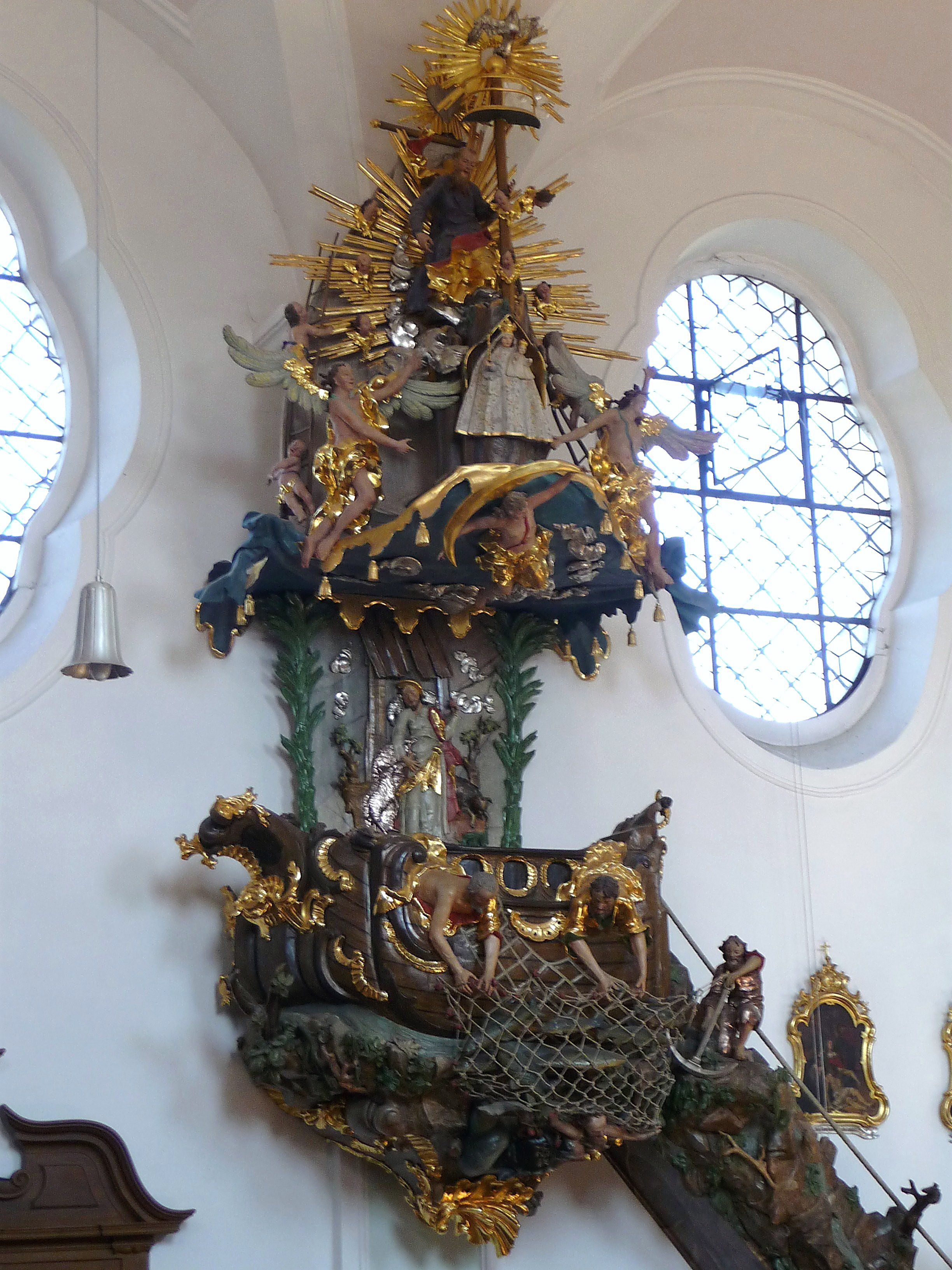 Die Schiffskanzel der Wallfahrtskirche Mariä Himmelfahrt in Weissenregen